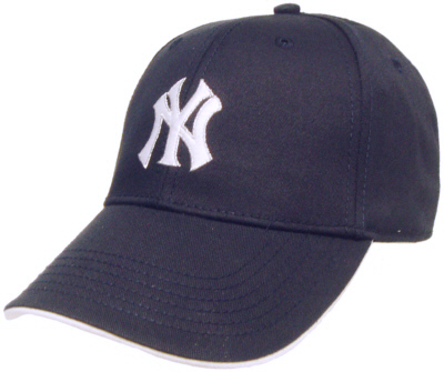 Basecap der New York Yankees